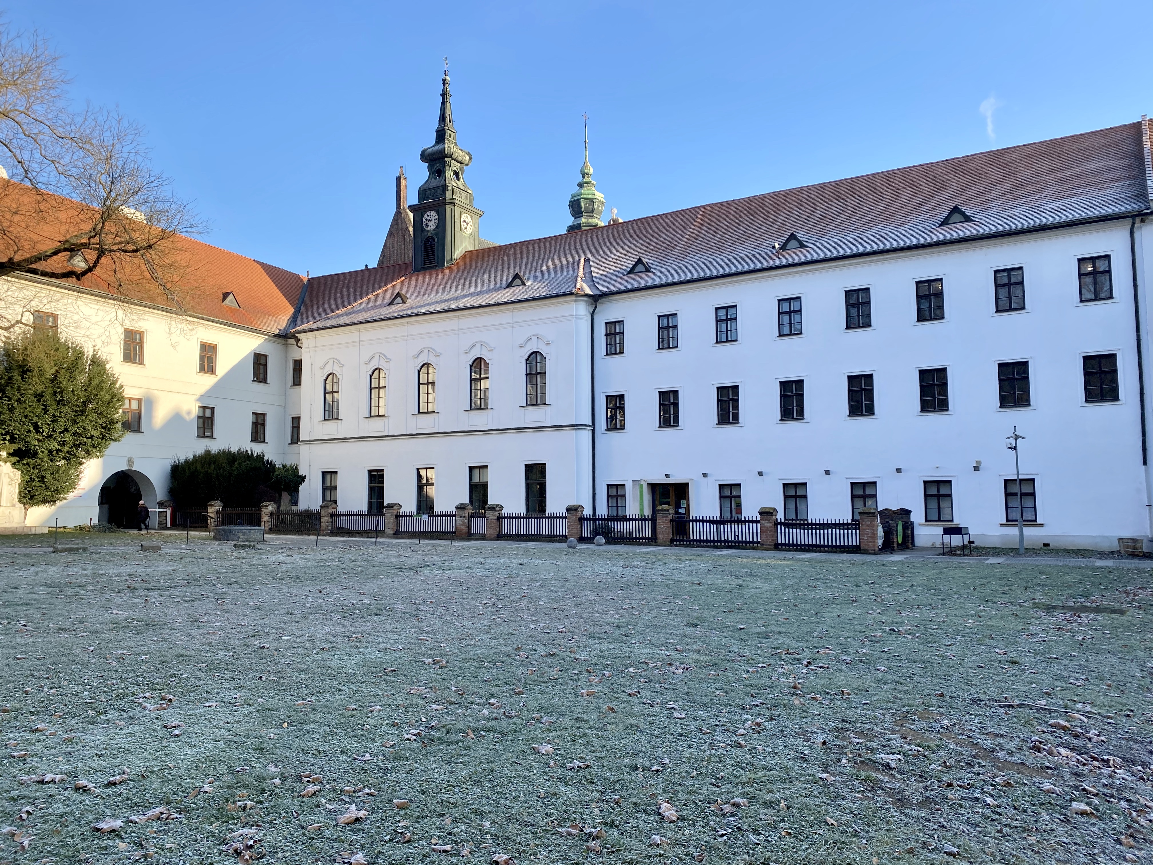 Abadia de Sant Tomàs de Brno - Pati